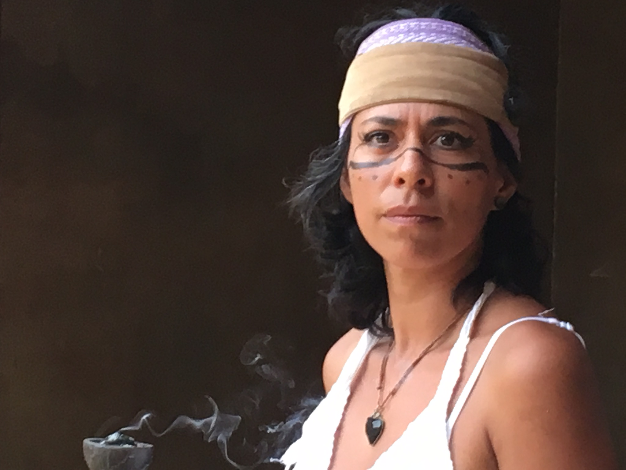 Obra de teatro en el Festival de Jazz de Mazunte (Oaxaca) de 2016